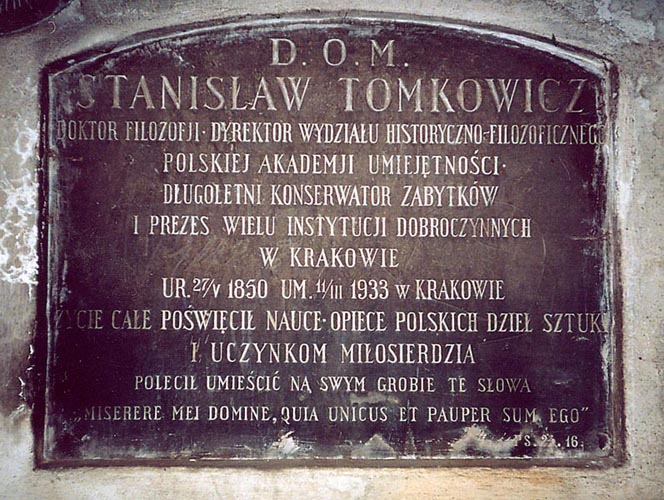 Epitafium Stanisława Tomkowicza na grobowcu Wężyków, Cmentarz Rakowicki w Krakowie, fot. T. Łopatkiewicz